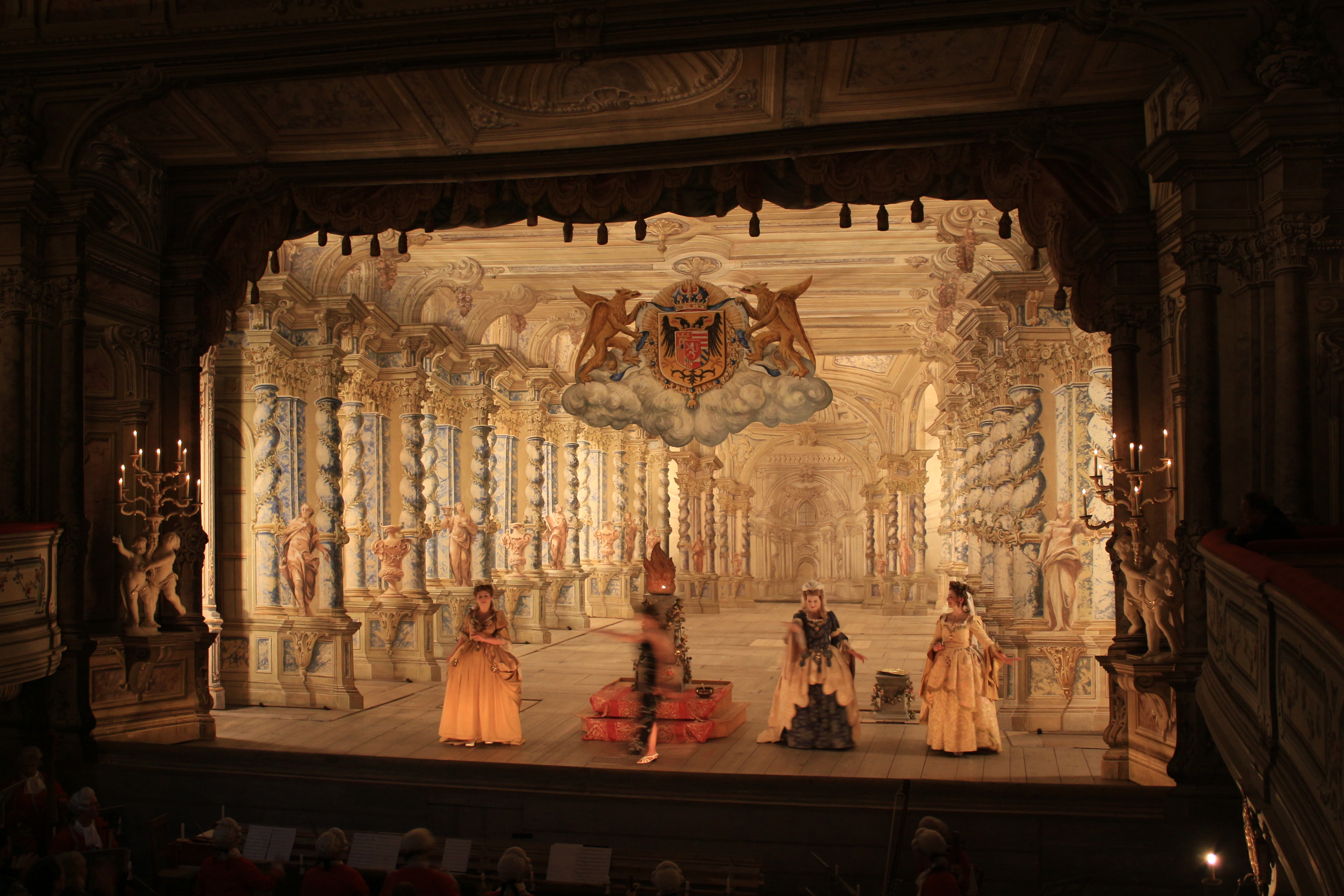 Představení opery Antonia Caldary "Il natale d’Augusto" v barokním zámeckém divadle v Českém Krumlově